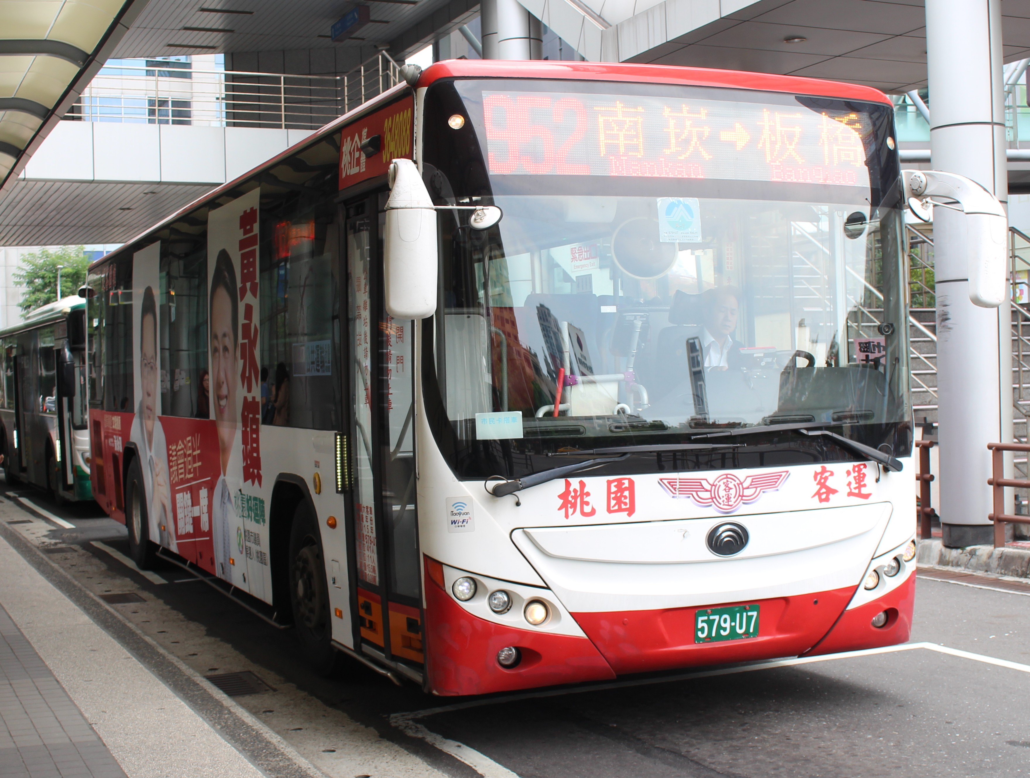 桃園客運2015 YUTONG ZK6118HGA 579-U7 952